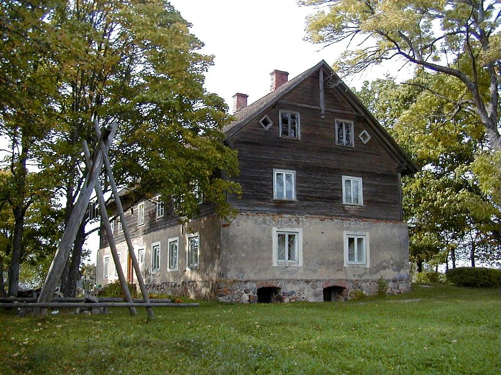 Druvienas vecā skola - J. Poruka muzejs 2001-09-21